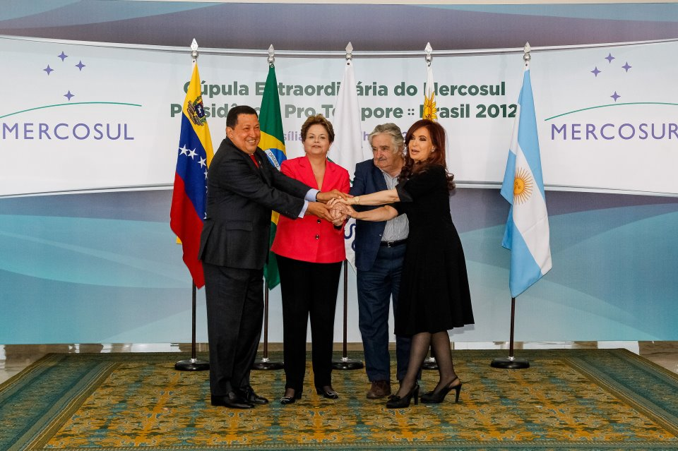 Los cuatro Presidentes de los cinco países miembros del Mercosur : Venezuela, Brasil, Uruguay y Argentina -(Paraguay se encuentra suspendido del bloque por la destitución del ex Presidente Fernando Lugo).